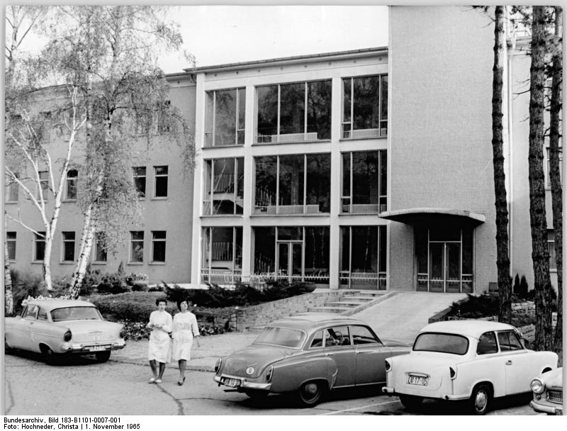 Berlin, Robert-Rössle-Klinik Zentralbild Hochneder 1.11.1965 Moderne Krebsforschung in der Robert-Rössle-Klinik Nicht nur in der DDR, sondern auch im Ausland ist die Robert-Rössle-Klinik in Berlin-Buch bekannt. Diese seit 1949 bestehende Klinik der Deutschen Akademie der Wissenschaften zu Berlin ist mit modernsten Geräten ausgestattet und bietet 220 Patienten, auch Ausländern, stationäre Behandlung. Gegenwärtig bemühen sich 395 Mitarbeiter darum, den vielen Patienten Linderung und Heilung zu geben. Die Regierung der DDR stellt jährlich 5,4 Millionen DM für Forschungsarbeiten und für die Patientenbehandlung zur Verfügung. Ärztlicher Direktor der Robert-Rössle-Klinik ist Professor Dr. Gümmel. UBz: Blick auf die Robert-Rössle-Klinik (Röntgenhaus).